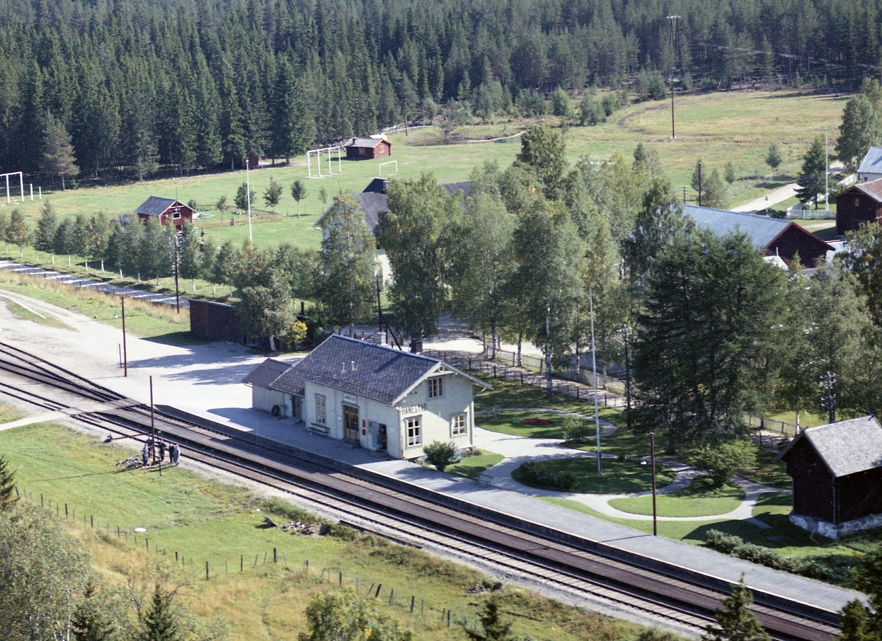 Hanestad stasjon med den opprinnelige stasjonsbygningen tegnet av Georg Bull. Ny bygning ble oppført i 1964. Widerøe-foto fra 1961, fra samlingen til Anno Musea i Nord-Østerdalen i Digitalt museum.